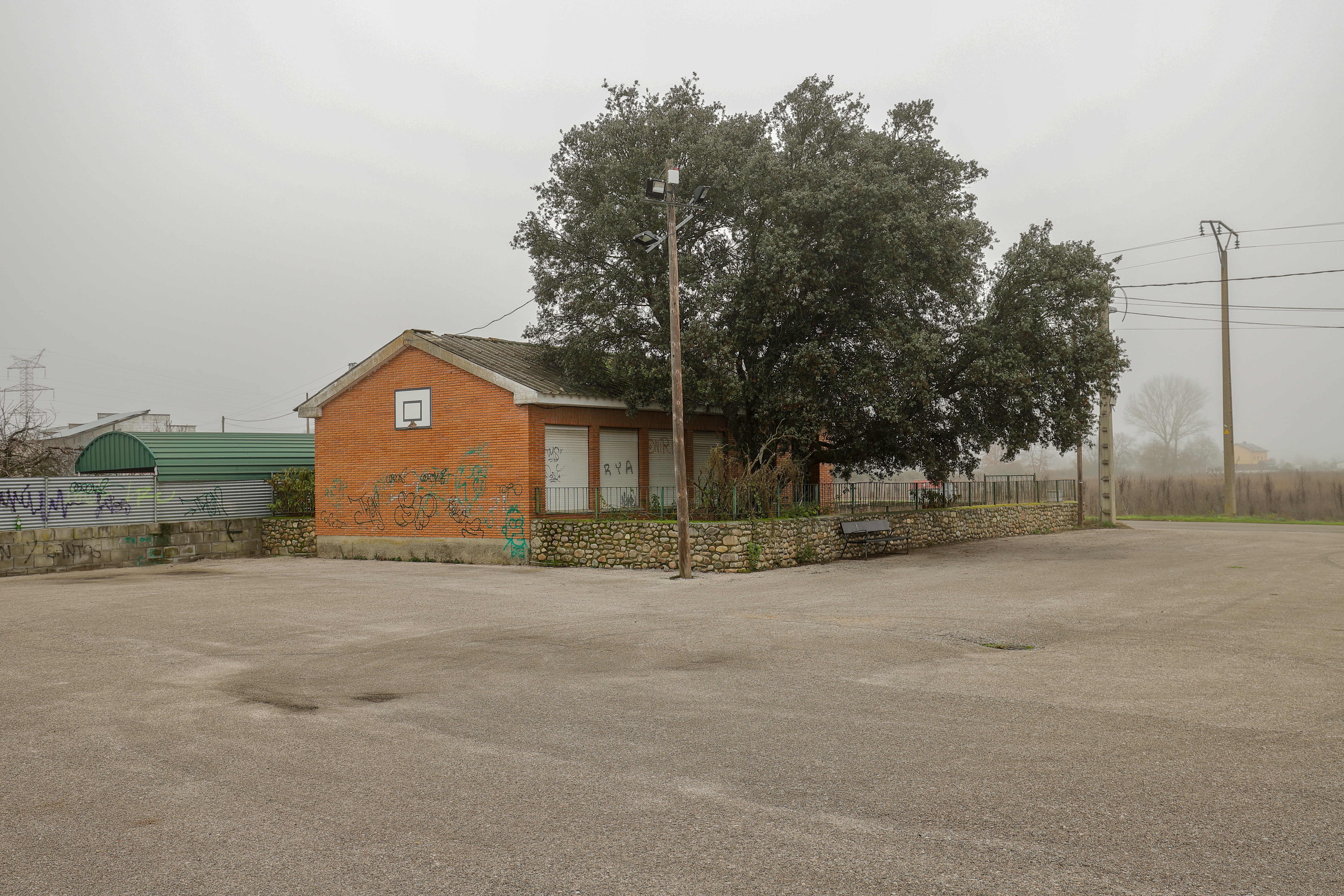 La Martina es una localidad del municipio de Ponferrada, en la comarca de El bierzo, provincia de León.